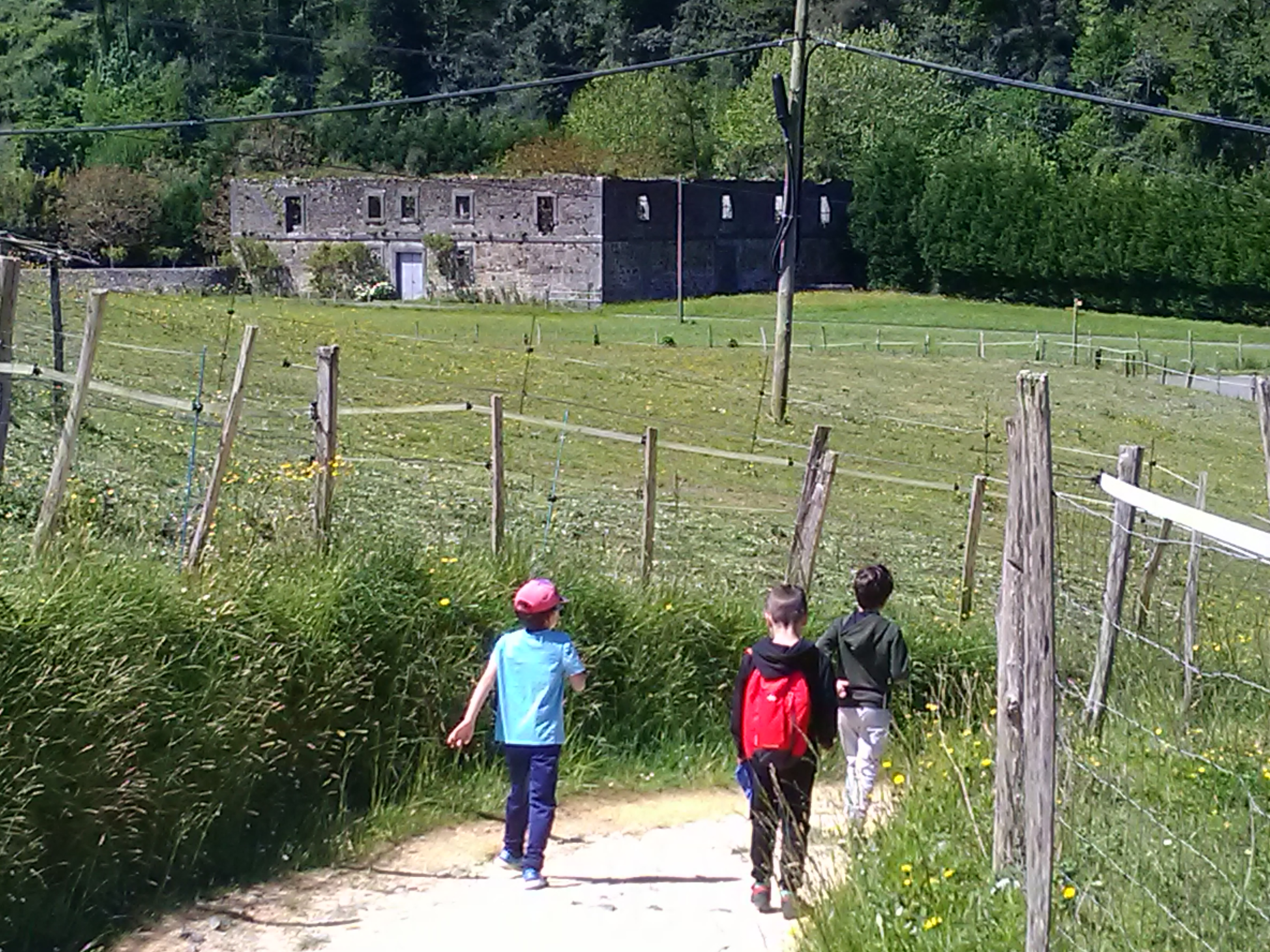 Haurrak Lea Ibilbidean oinez, Mendexako lurretan; atzean, Ospitale Zaharra.